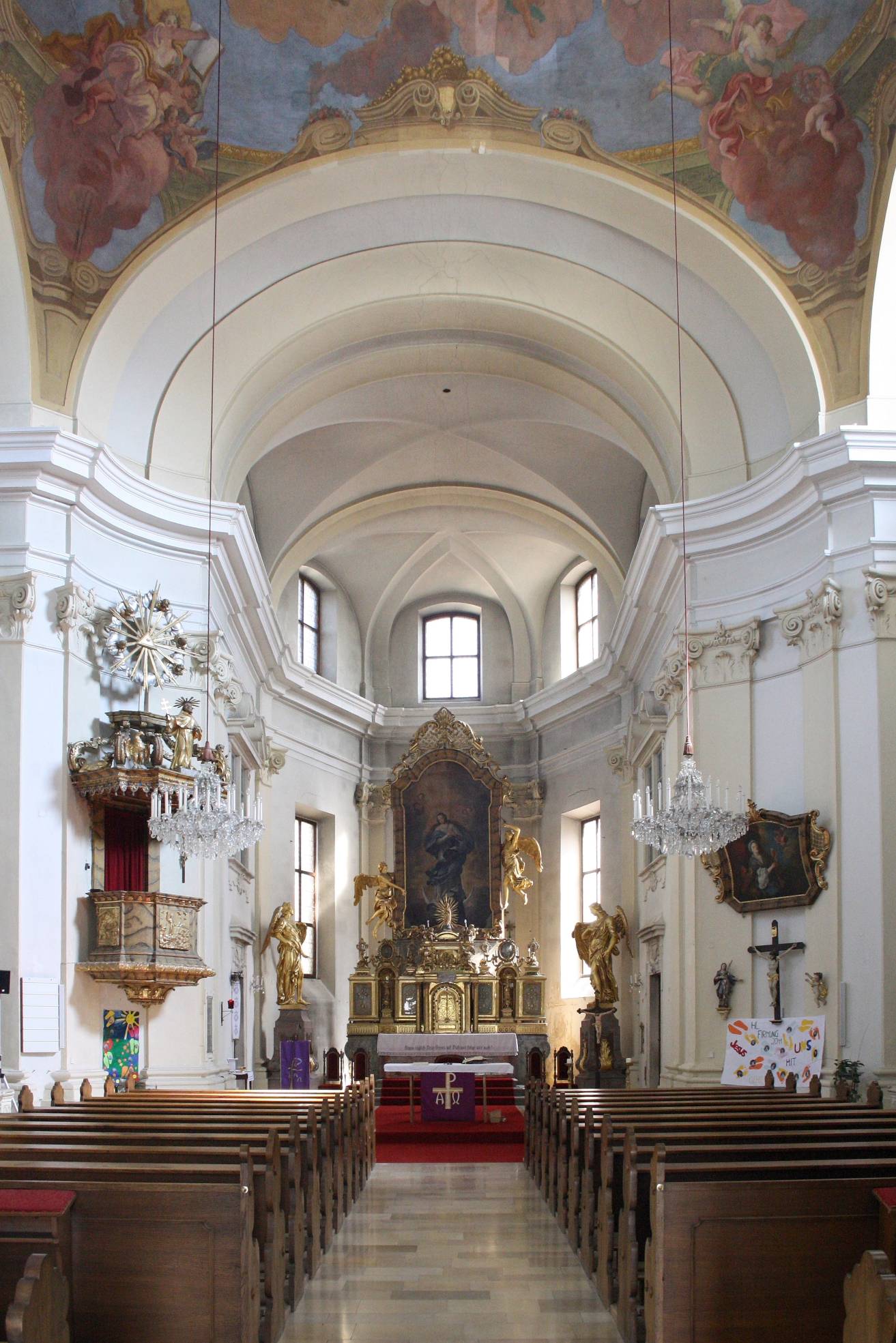 Die Innenansicht Richtung Altar der Pfarr/Klosterkirche in Wimpassing an der Leitha.